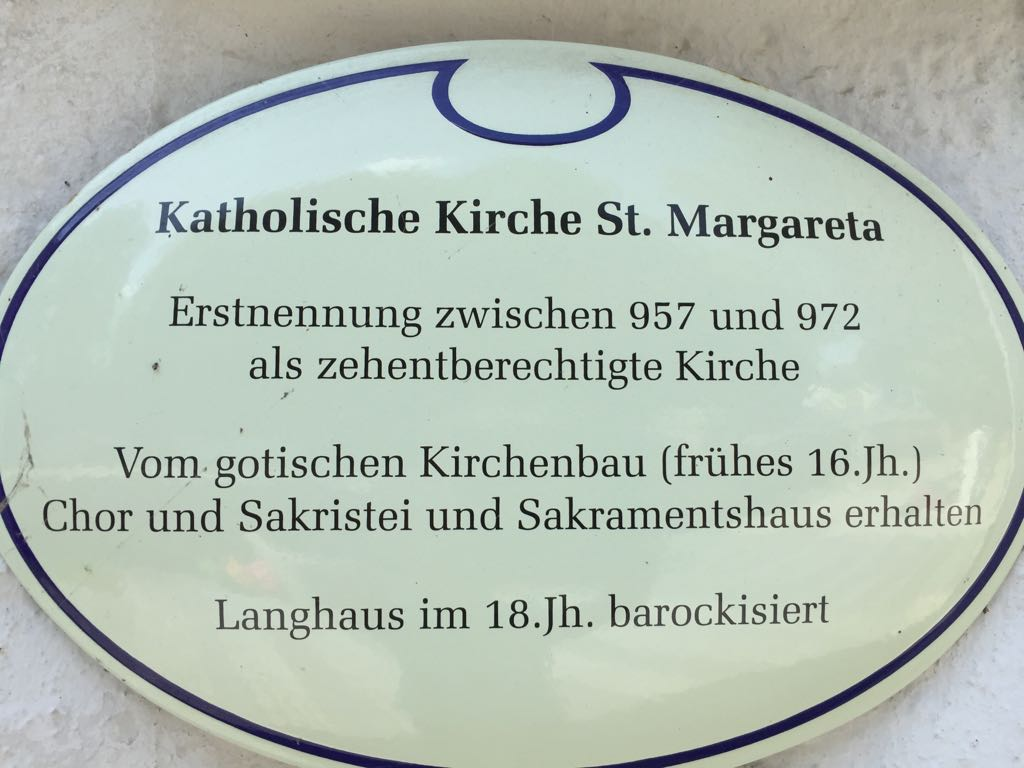 Steintafel an Kirche St. Margareta in Dornach